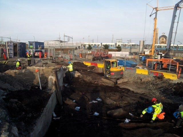 Våren 2014 gräver arkeologer på Gamlestadstorget i Göteborg fram gravar och kistrester från den senmedeltida stadskyrkas kyrkogård, en hel sko och ett omkullvält staket på en av stadstomterna i Nya Lödöse. Det har stått längs med en vad arkeologerna på plats tolkar vara en trälagd gång, en kavelbro.